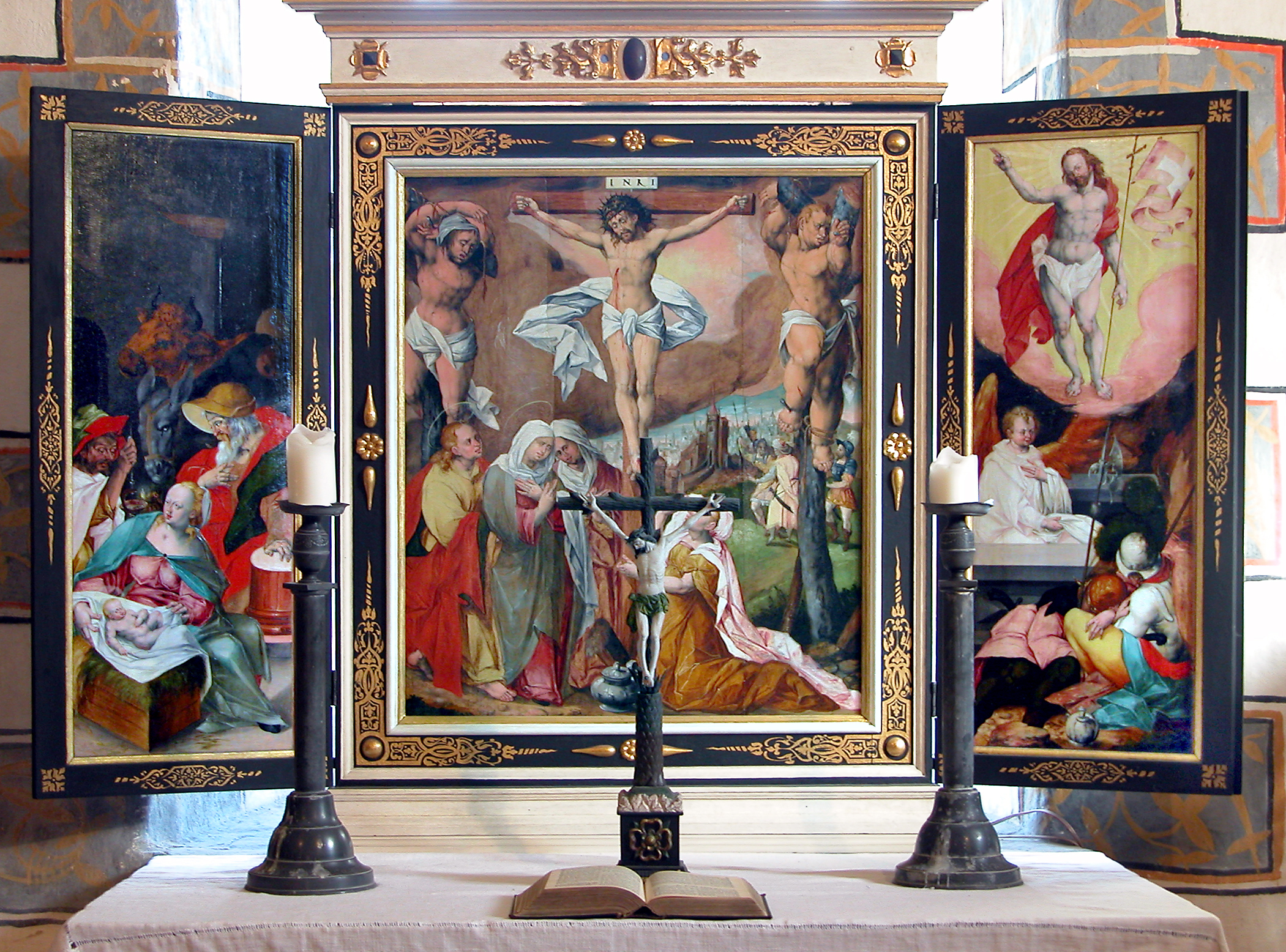 15.10.2007 08115 Schönfels (Gemeinde Lichtentanne): Burg Altschönfels, Burgkapelle, Ende 15. Jh. mit Renaissance-Flügelaltar von M. Krodel d. J. [DSCN30605.TIF]20071015230DR.JPG(c)Blobelt